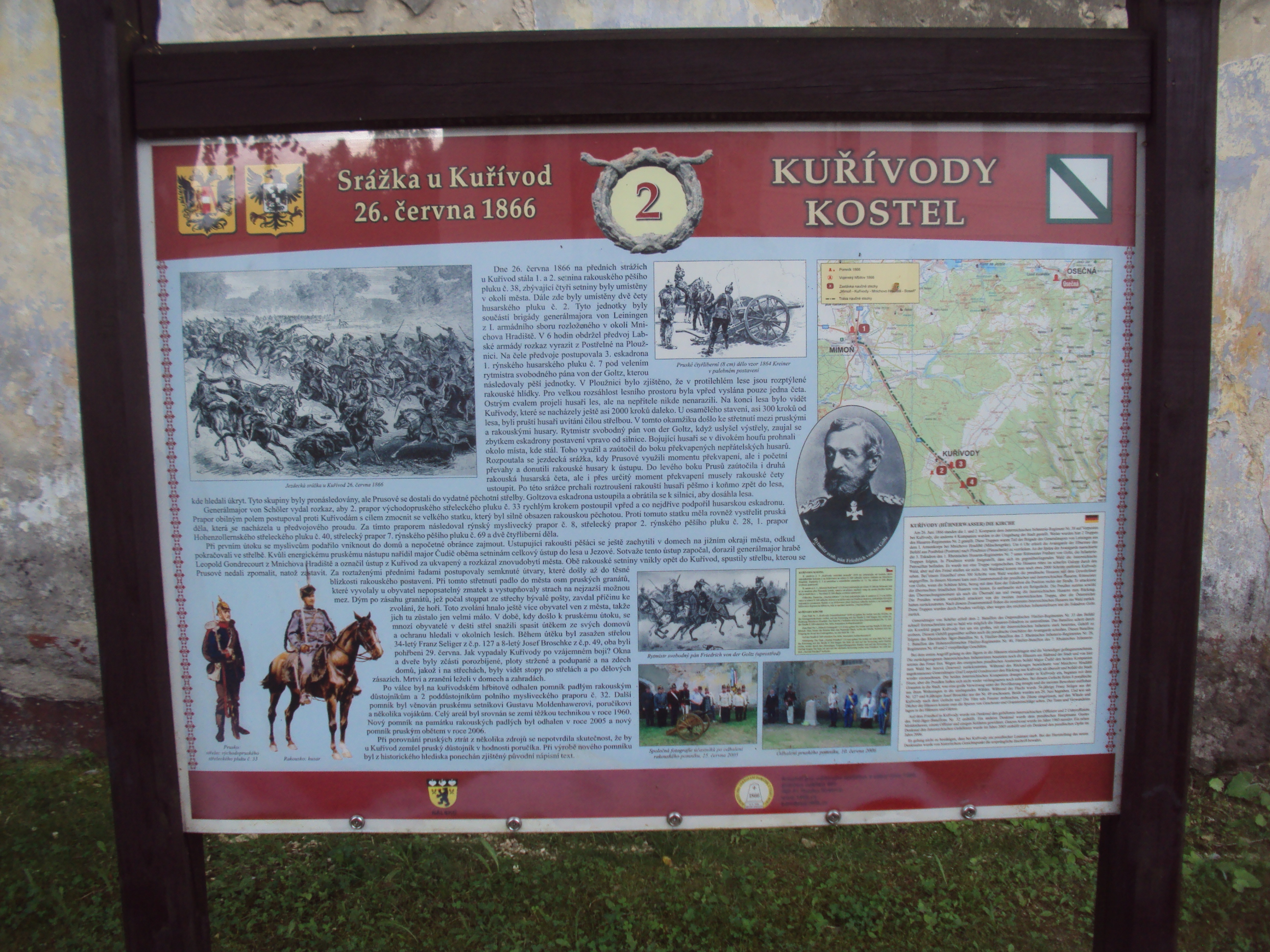 Tabule č.2 z naučné stezky Prusko-rakouské války 1866 v obci Kuřívody